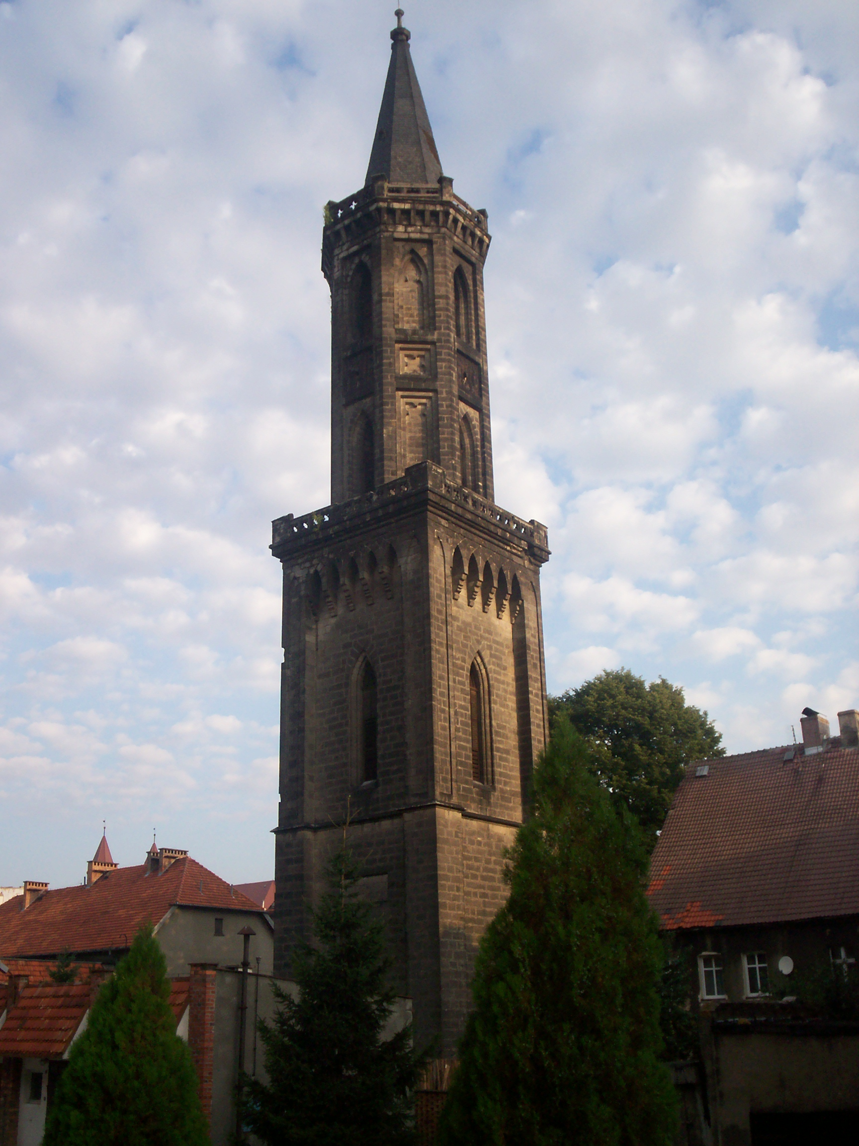 Wieża dawnego kościoła ewangelickiego.